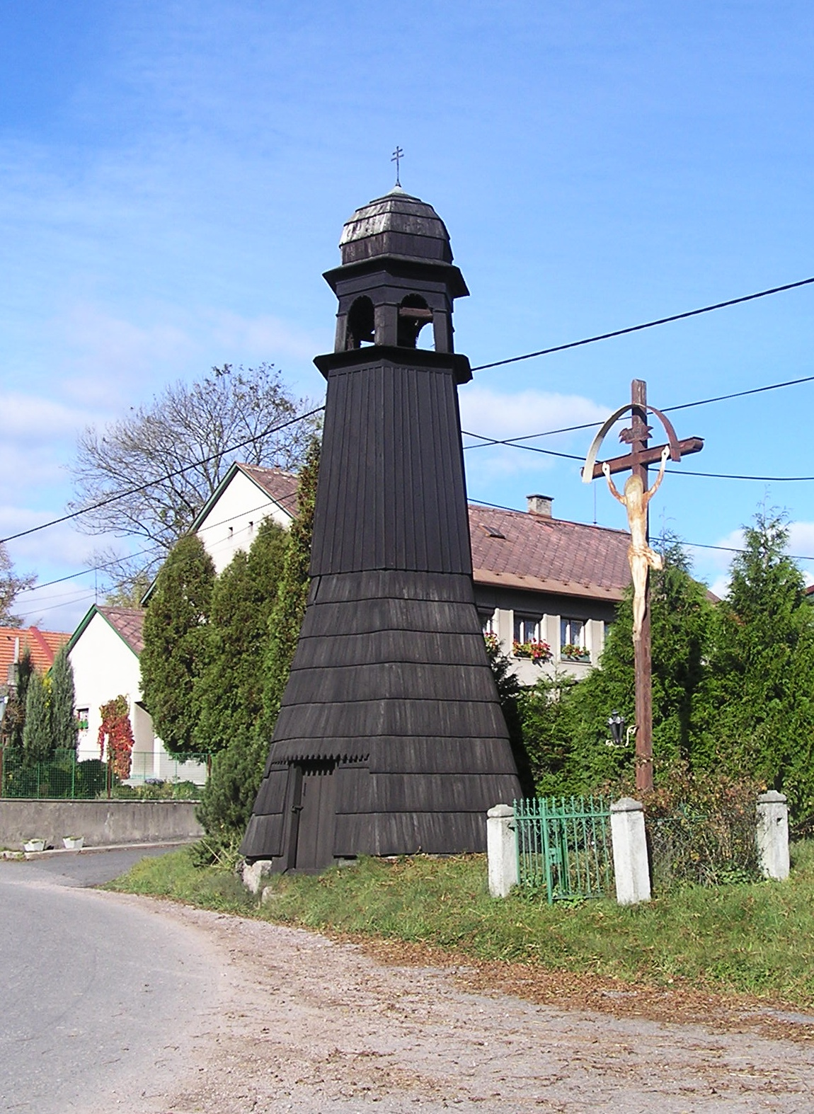 Bell Tower in Zachlumi